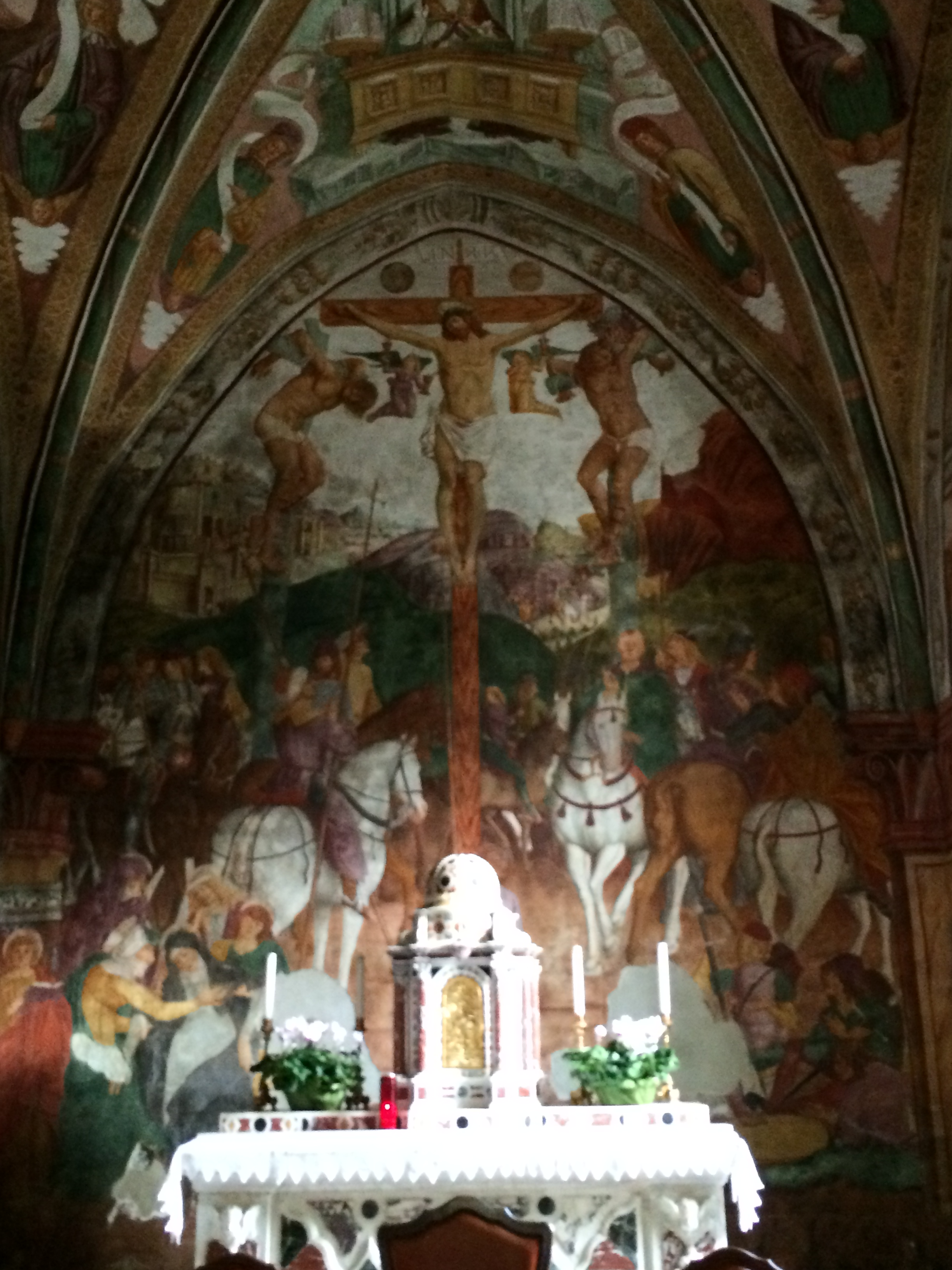 Chiesa San Leonardo (Provesano) - Abside 02